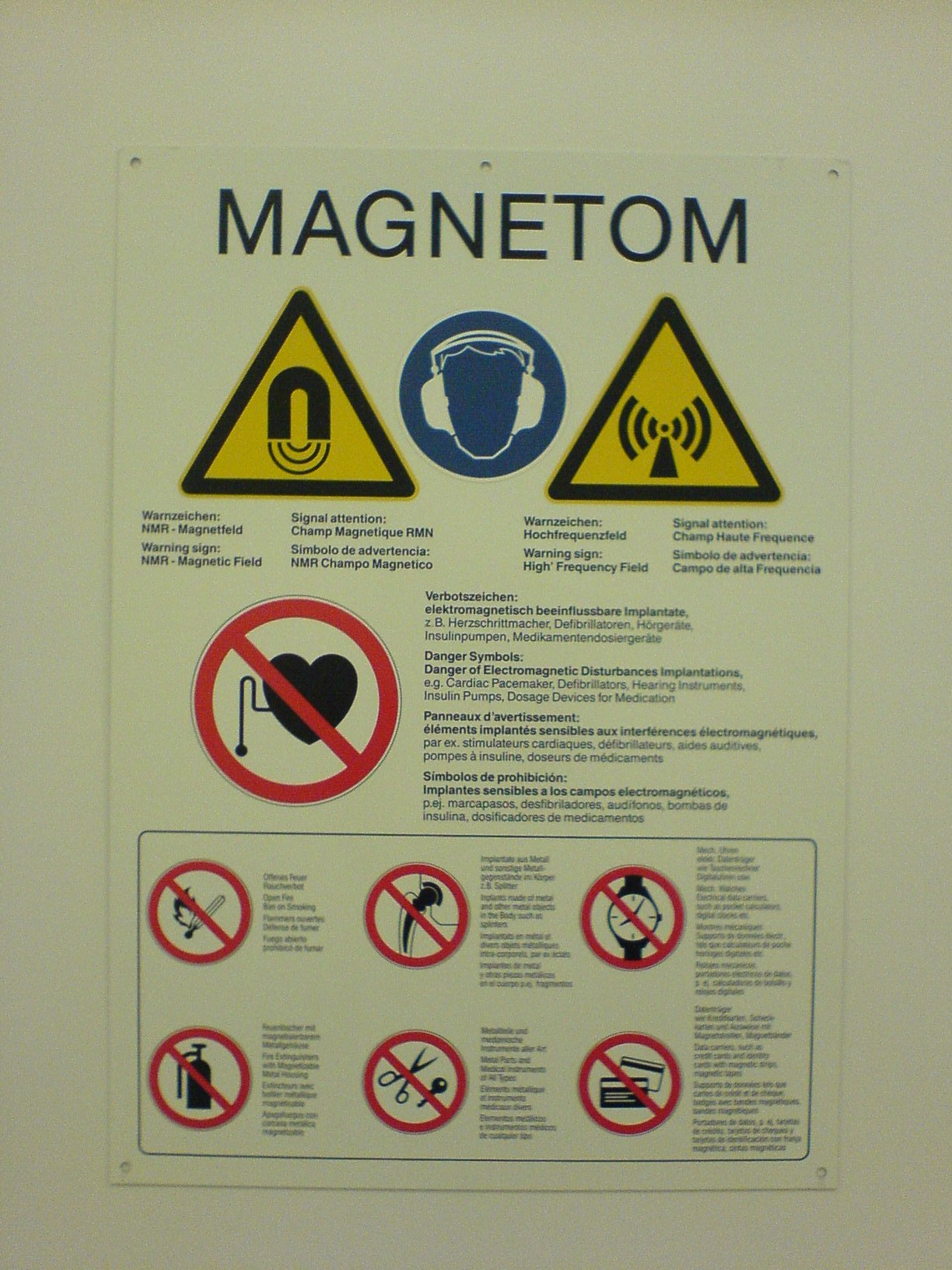 Warn- und Hinweisschilder am Eingang zu einem Raum mit einem Siemens Magnetom (Magnetresonanztomographie) in einem deutschen Krankenhaus (Chirurgische Klinik Innenstadt der Ludwig-Maximilian-Universität München)